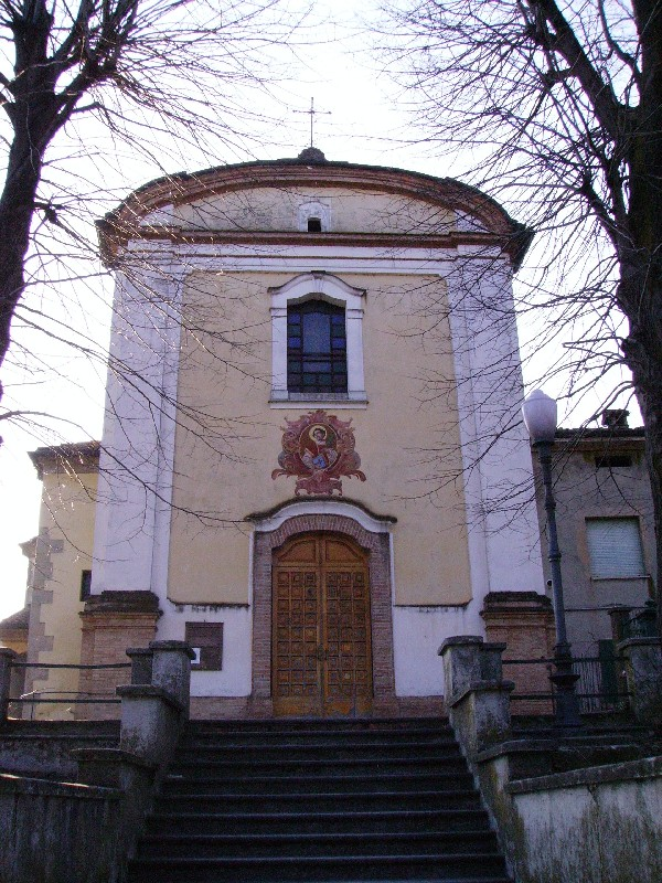 La facciata della chiesa di S.Lorenzo martire